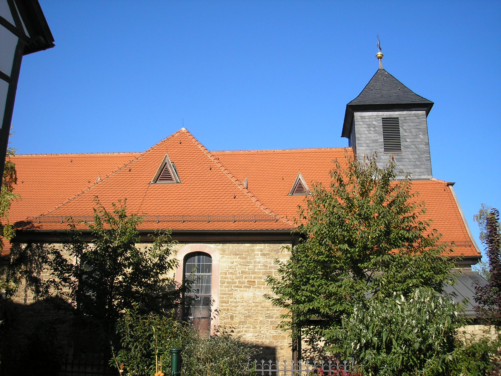 Die Melchendorfer Kirche in Erfurt.